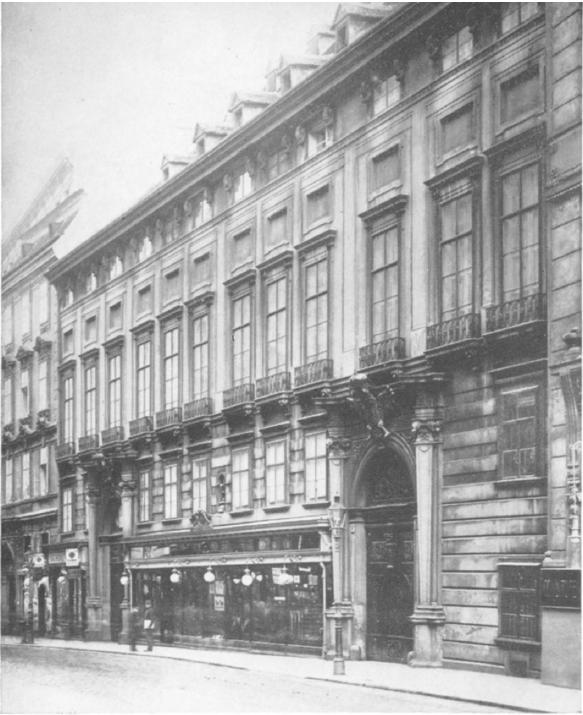 Palais Paar in Wien. (1, Wollzeile 30 und 32, Zedlitzgasse 1, 3 und Teil von 5). Abbruch 1938.